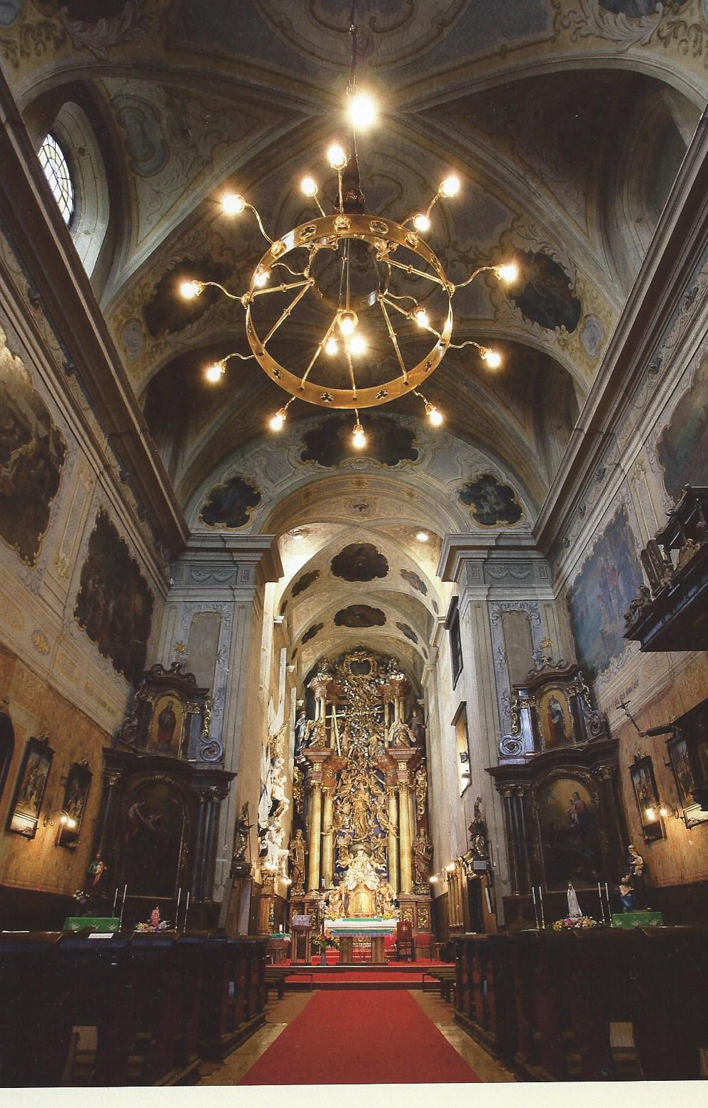 Kostol zvnútra